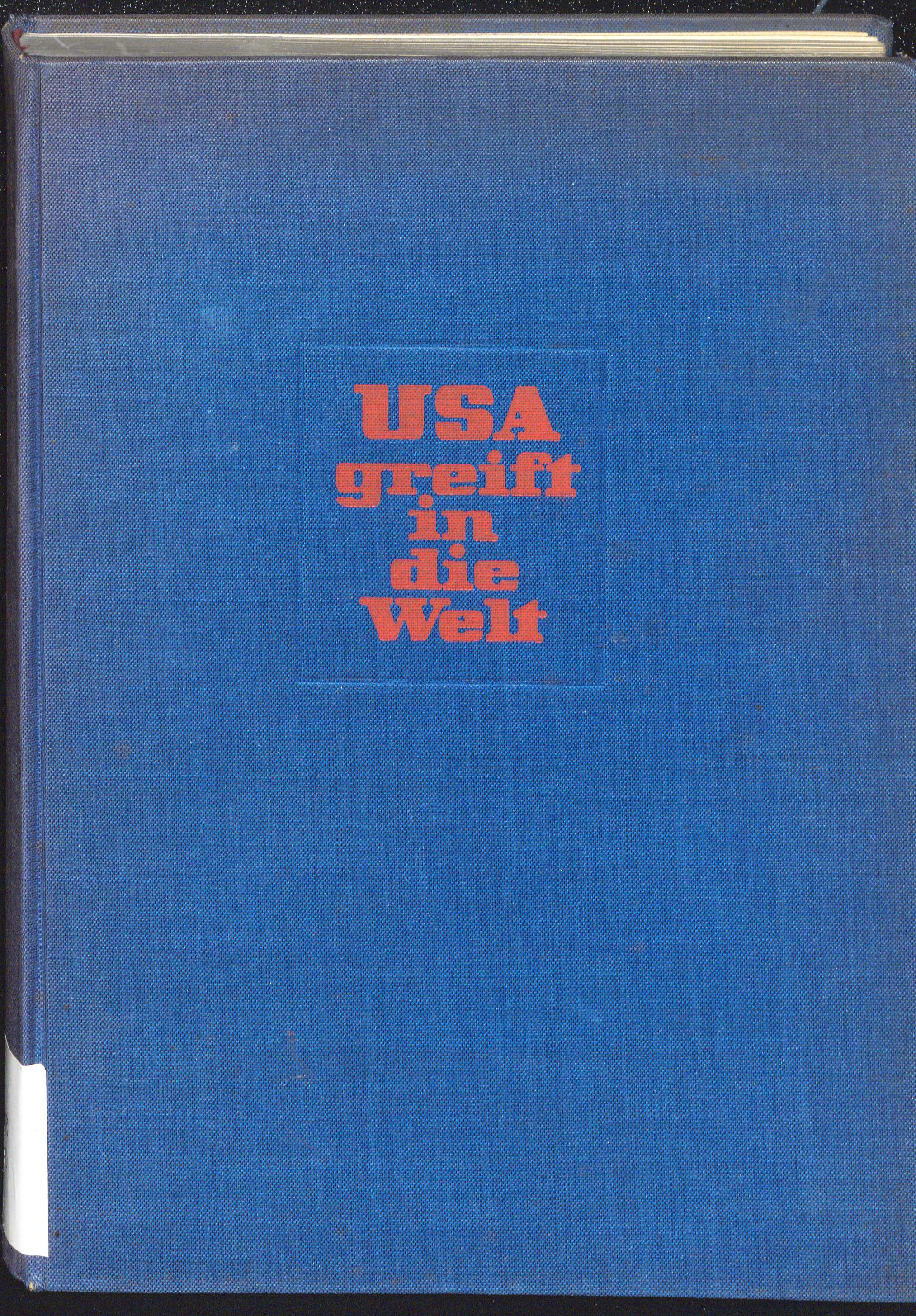 Adolf Halfeld USA. greift in die Welt. Hamburg : Broschek, 1941 Einband